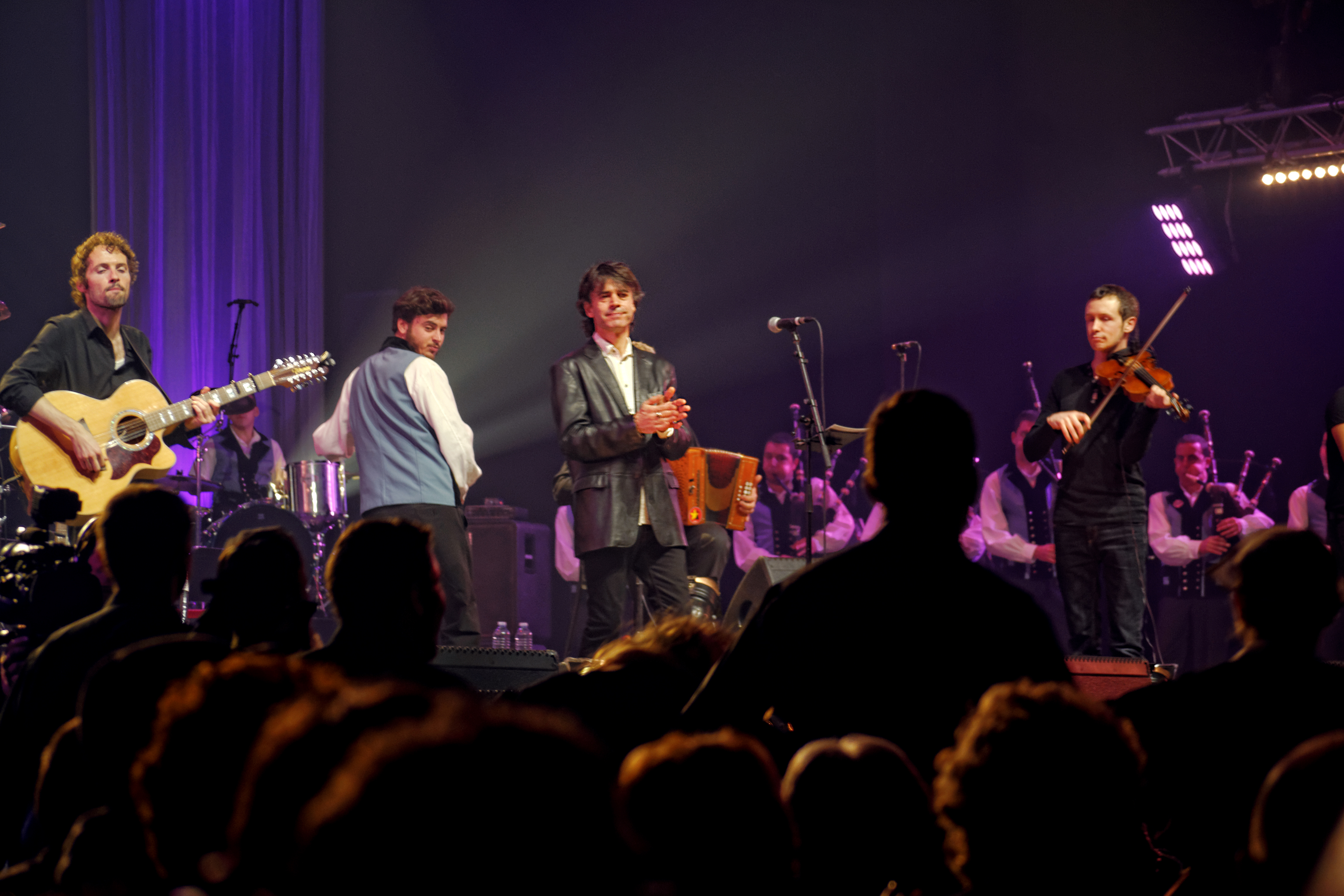 Denez Prigent, accompagné du Bagad de Vannes, en concert pour la Nuit de la Bretagne au parc de Langolvas à Morlaix le 22 janvier 2016.